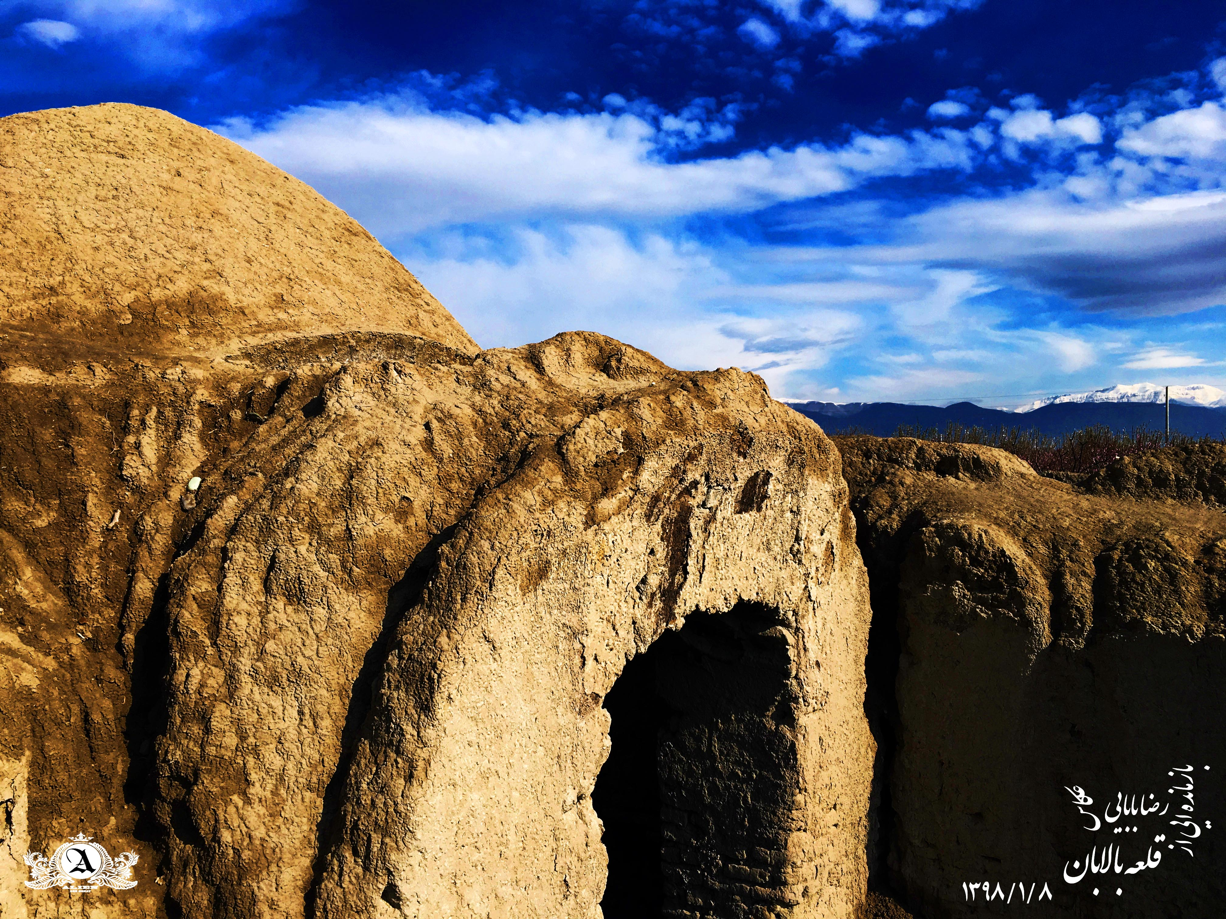 tape balaban1